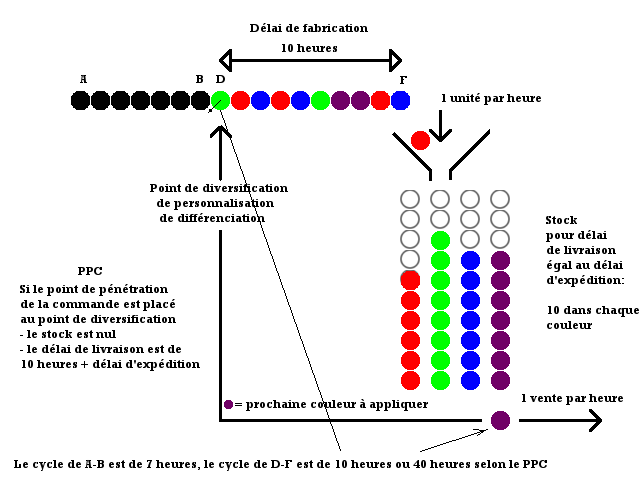 Cycles de production; stocks et point de pénétration de commande.